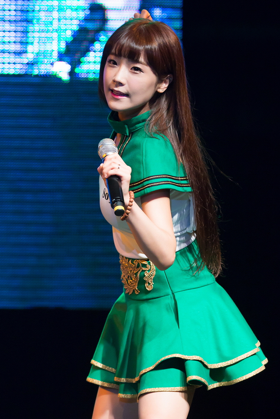 (15.08.22) CRAYON POP 크레용팝 의정부 착한콘서트